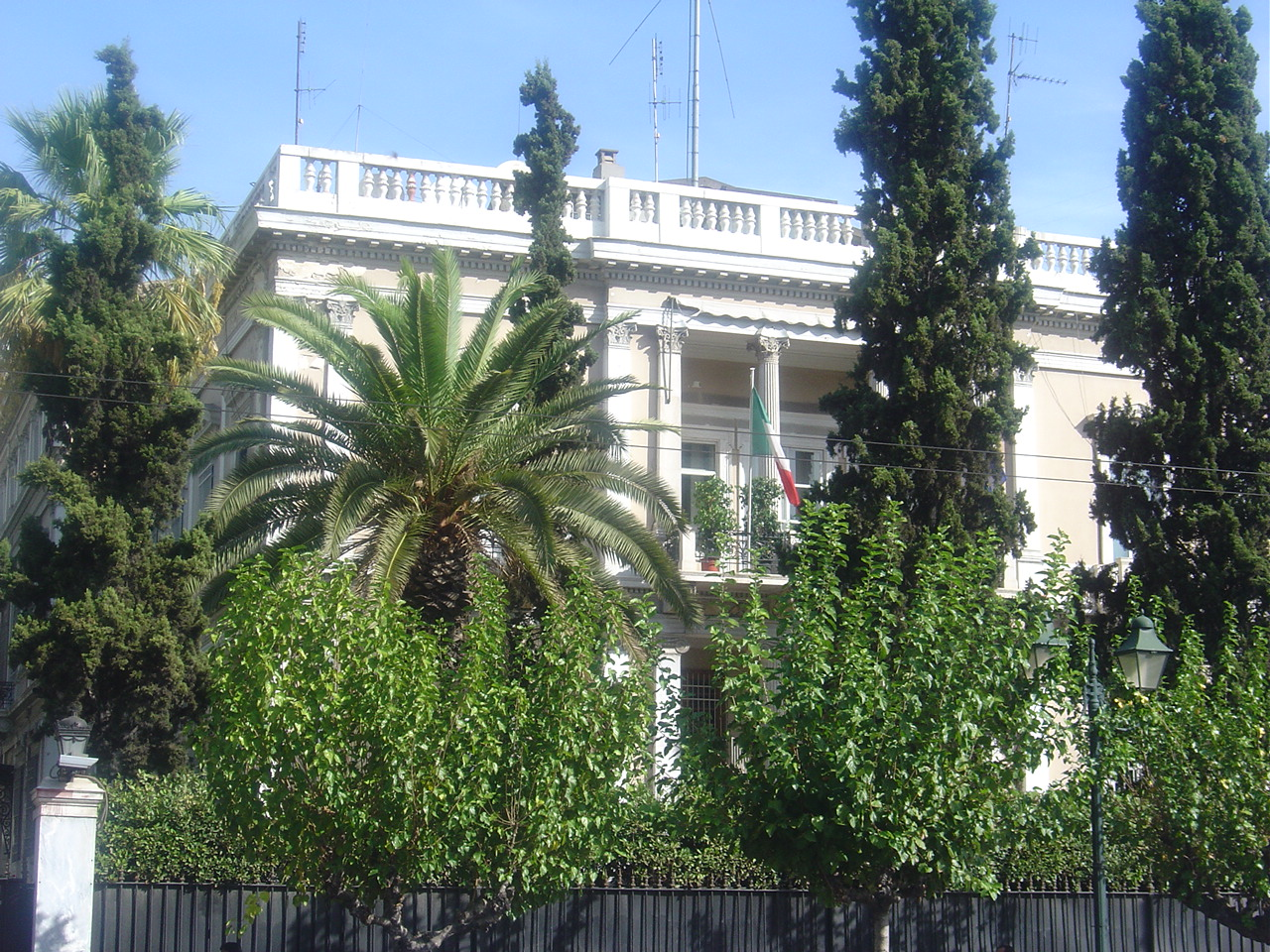 Το Μέγαρο Ψύχα στην Αθήνα (Ιταλική Πρεσβεία)